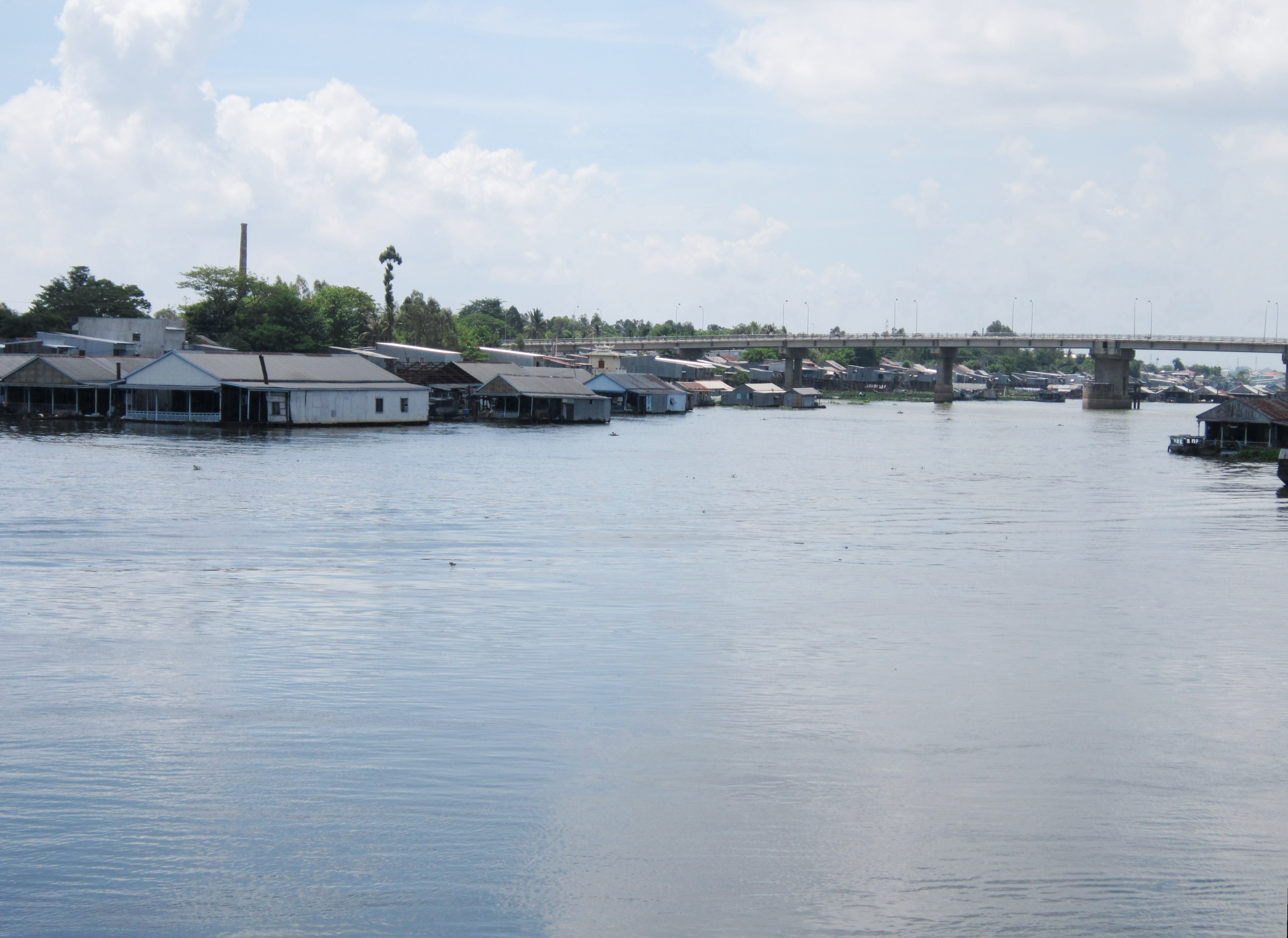 Sông Châu Đốc (An Giang) chỗ cầu Cồn Tiên.